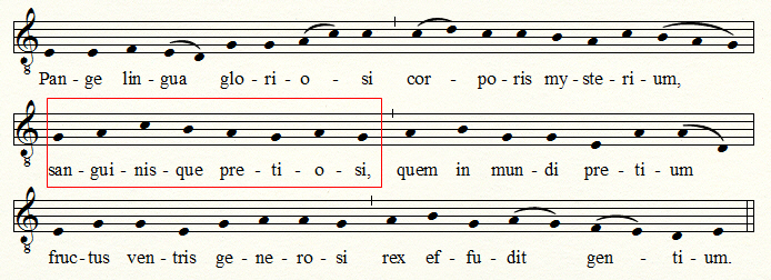 Gregorian chant of 3rd tone (standard melody)